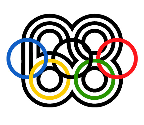 Mexico 68 logo